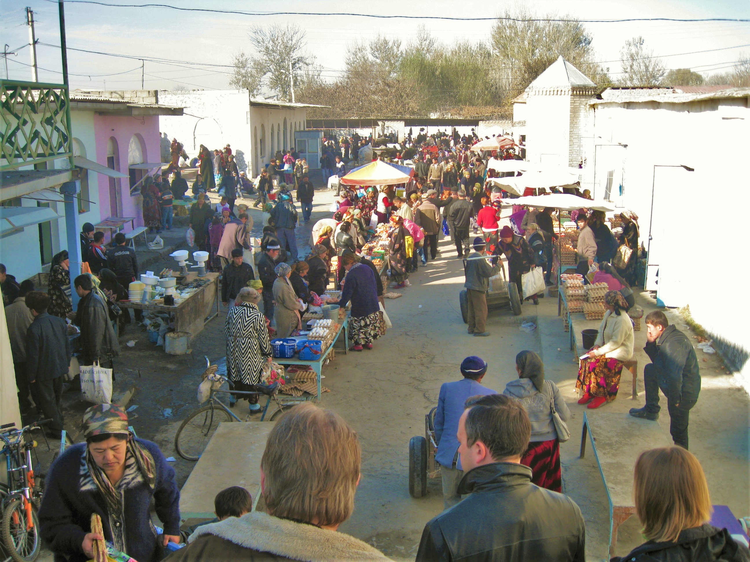 Базар в г. Каттакурган